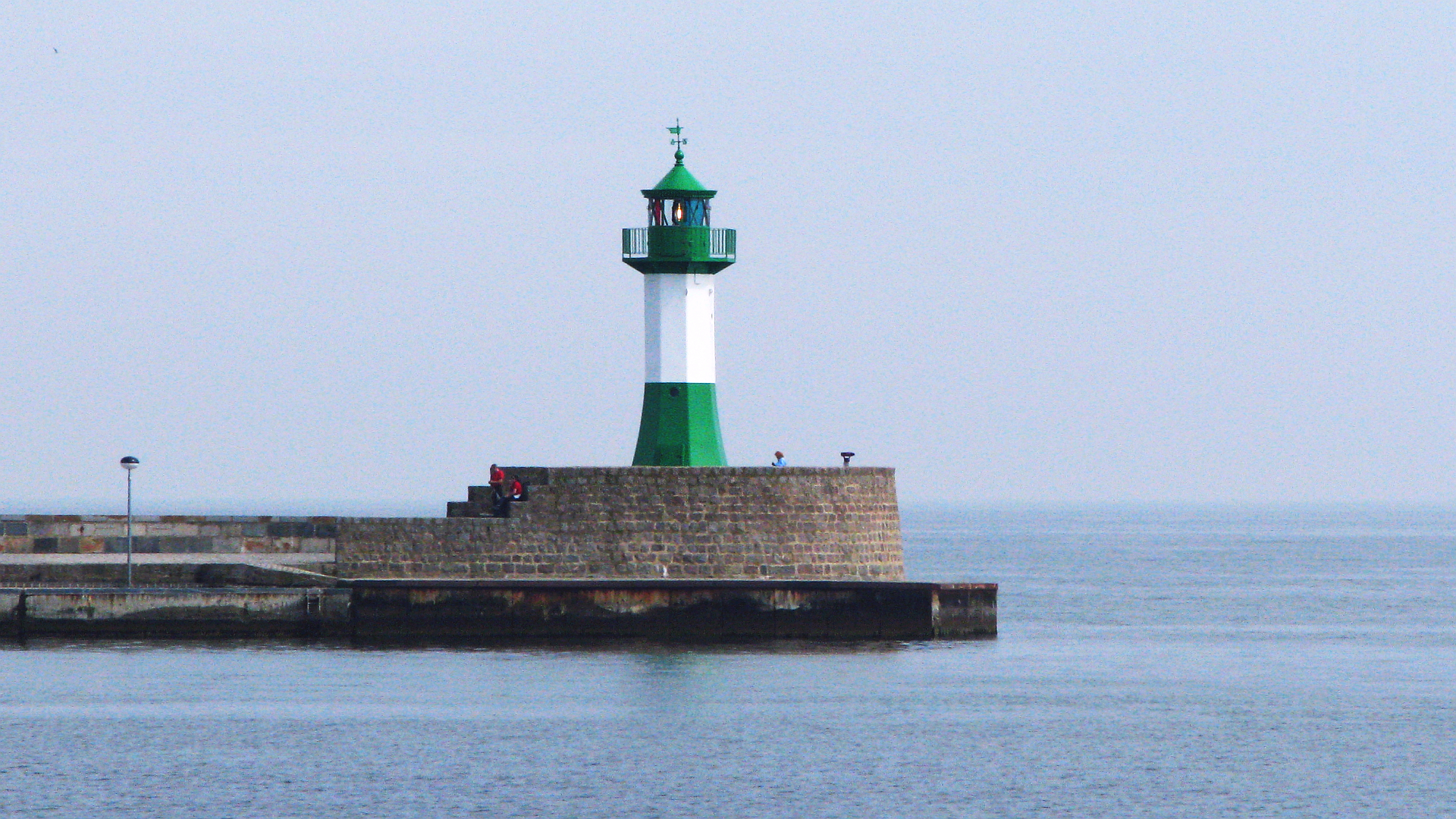 Sassnitz Molenfeuer von 1937 auf der Ostmole. Kennnung Hafeneinfahrt für einlaufende Schiffe steuerbords. Stahl-Leuchtturm über 15 m Höhe NHN - Foto Wolfgang Pehlemann IMG_8451